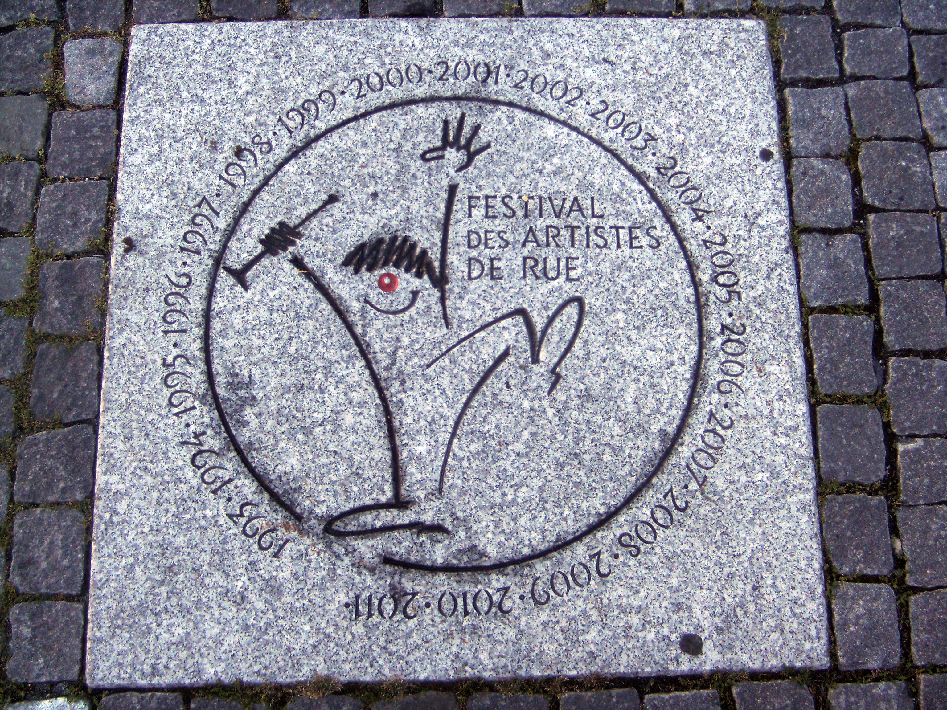 Vevey (Suisse) - Festival des artistes de rue - dalle commémorative sur la place Scanavin.